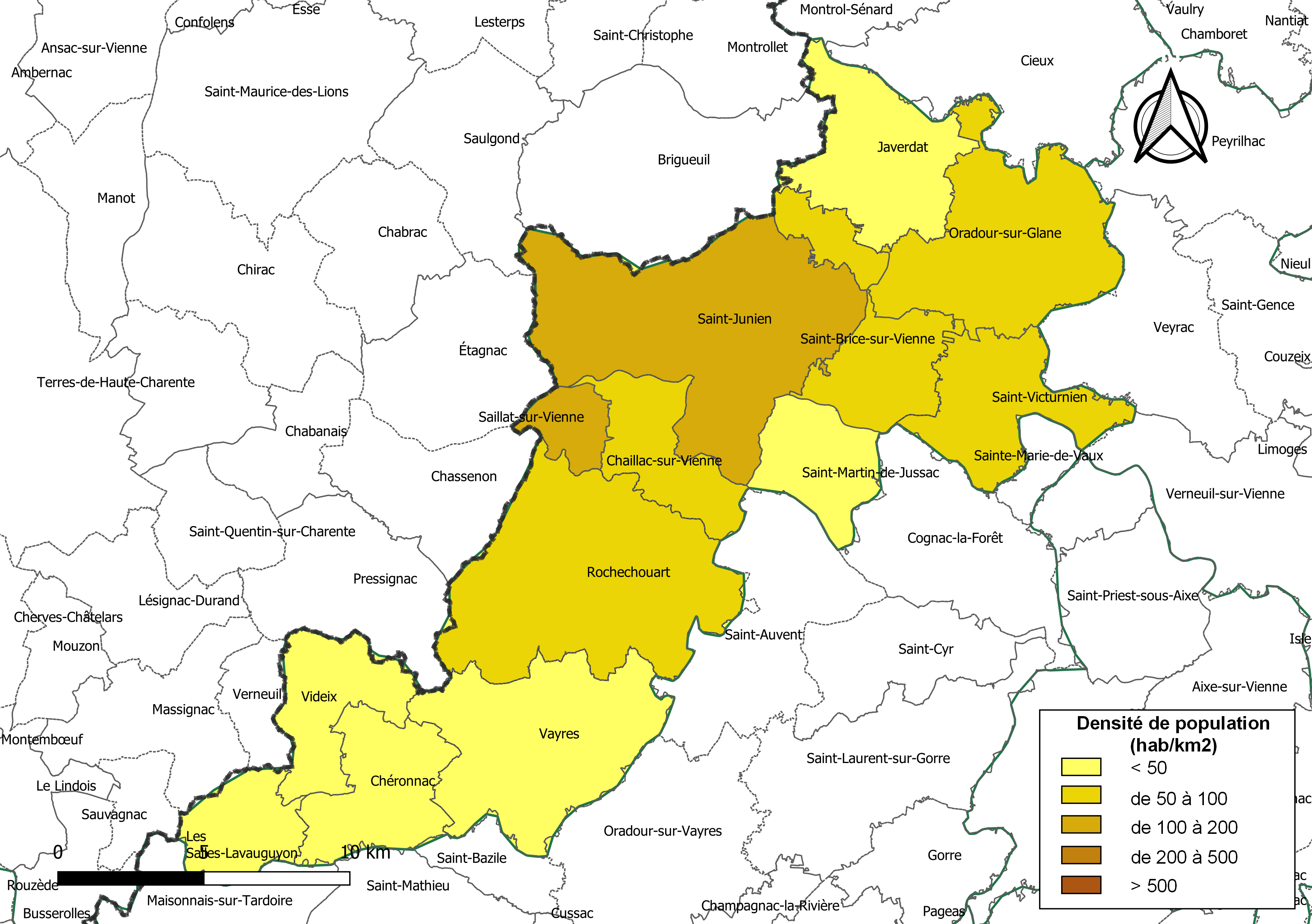 Carte des densités de population (millésimée 2016) des communes de la Communauté de communes Porte Océane du Limousin, département de la Haute-Vienne, France. Composition au 1er janvier 2019.